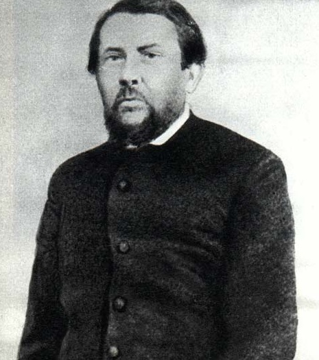 Russian poet Vladimir F Raevsky